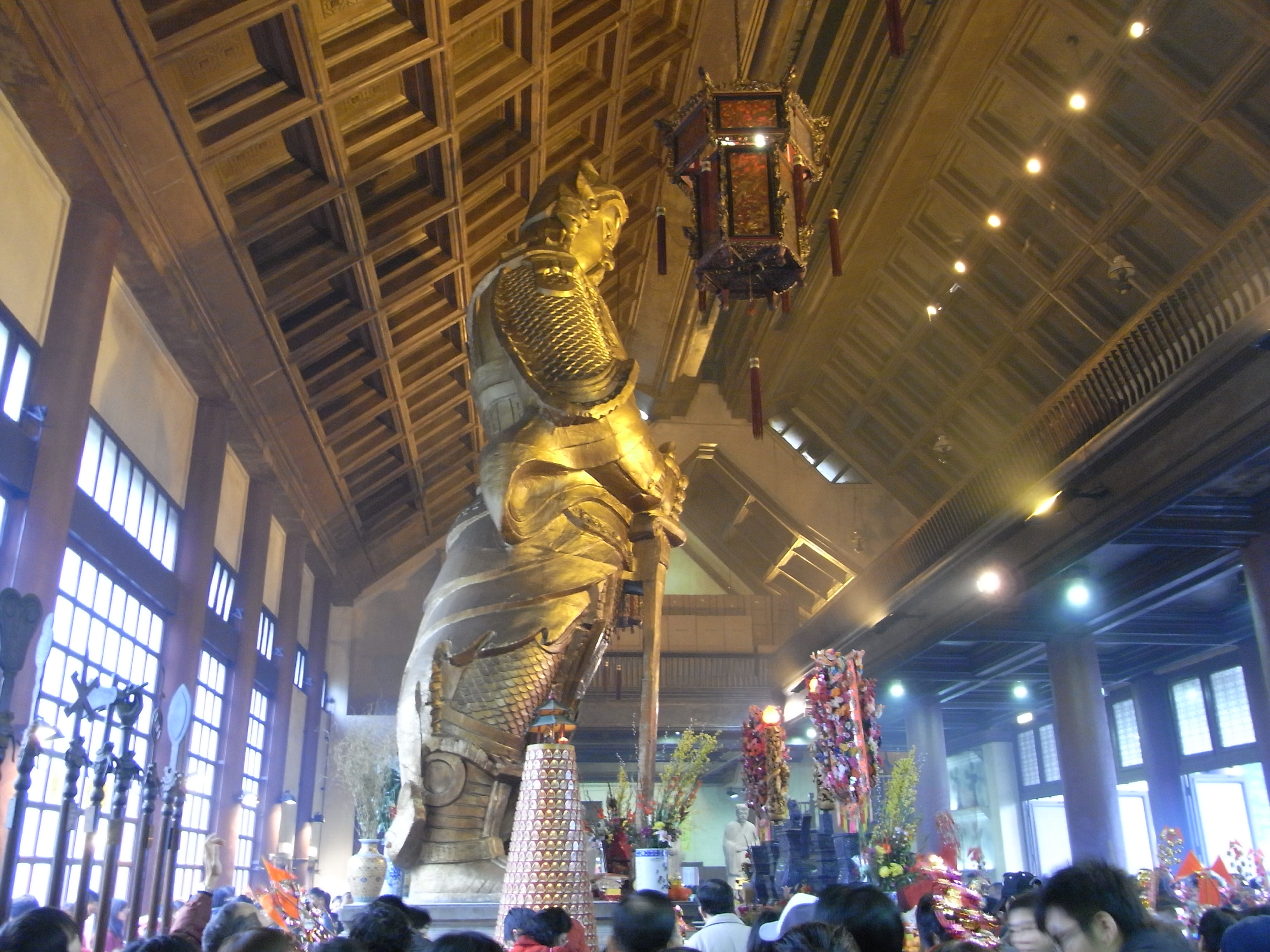 中文（香港）: 沙田區zh:大圍車公廟 將軍zh:神像